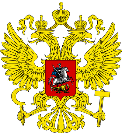 Герб Российской Империи (атолл Суворова)